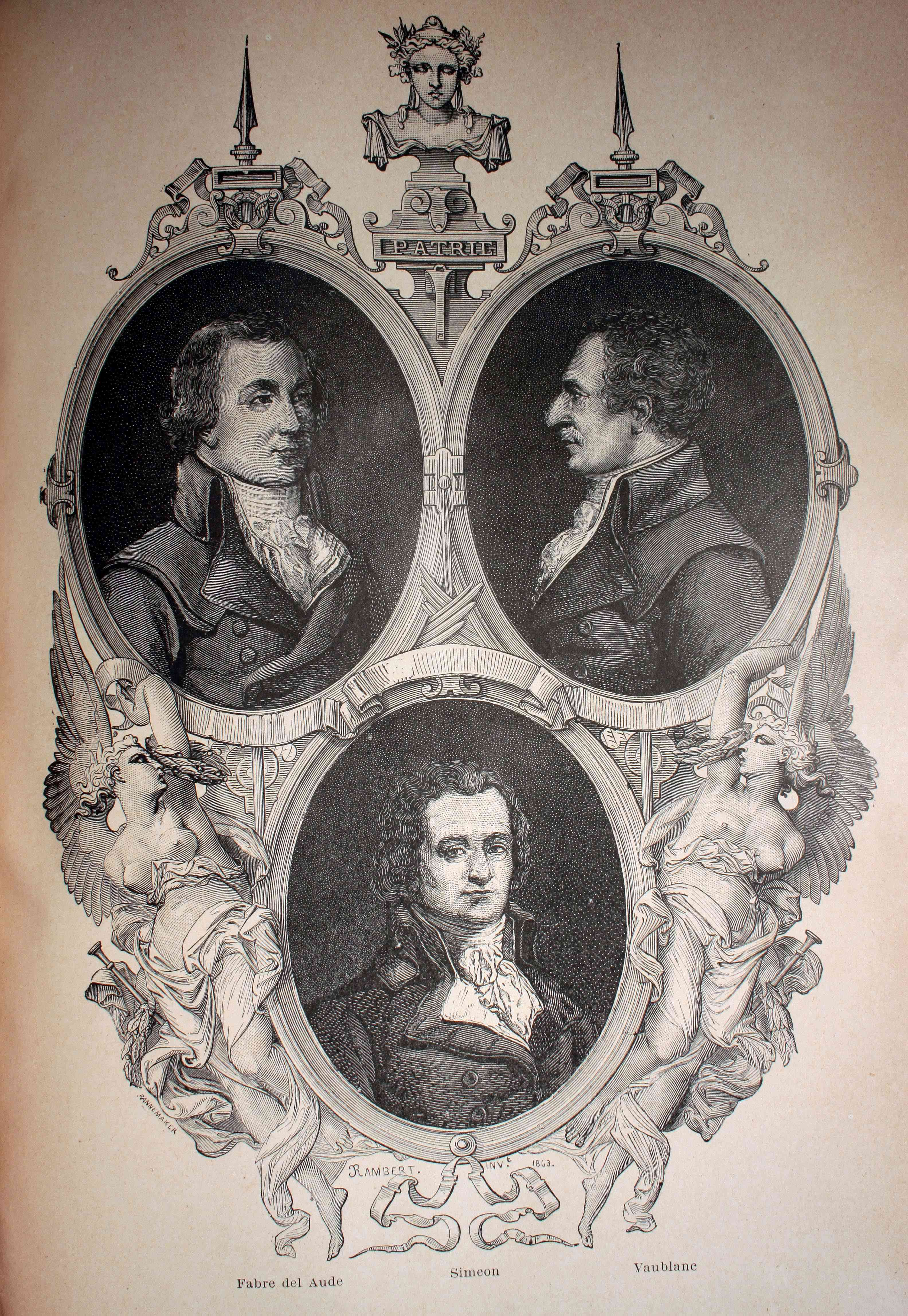 "Fabre del Aude, Siméon, Vaublanc". Ilustraciones de la obra : Historia del Consulado y del Imperio : continuación de la historia de la Revolución Francesa / por A. Thiers. - Barcelona : Montaner y Simón, 1879